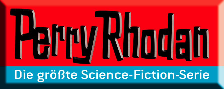 Das im Jahr 2008 aktuelle Logo der Heftserie Perry Rhodan